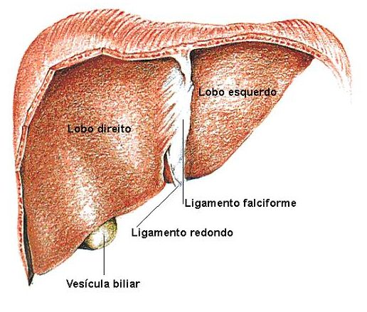 This image was copied from pt. The original description was: Fígado anterior. by Angeloleithold. Descrição Vista anterior de um fígado. Fonte Angeloleithold, acervo particular. Licença